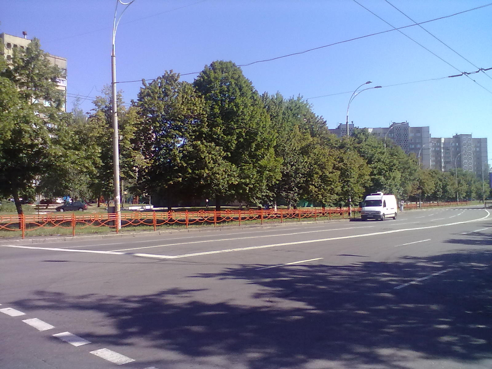 Проспект Георгия Гонгадзе (вид на угол дома номер 18) Киев